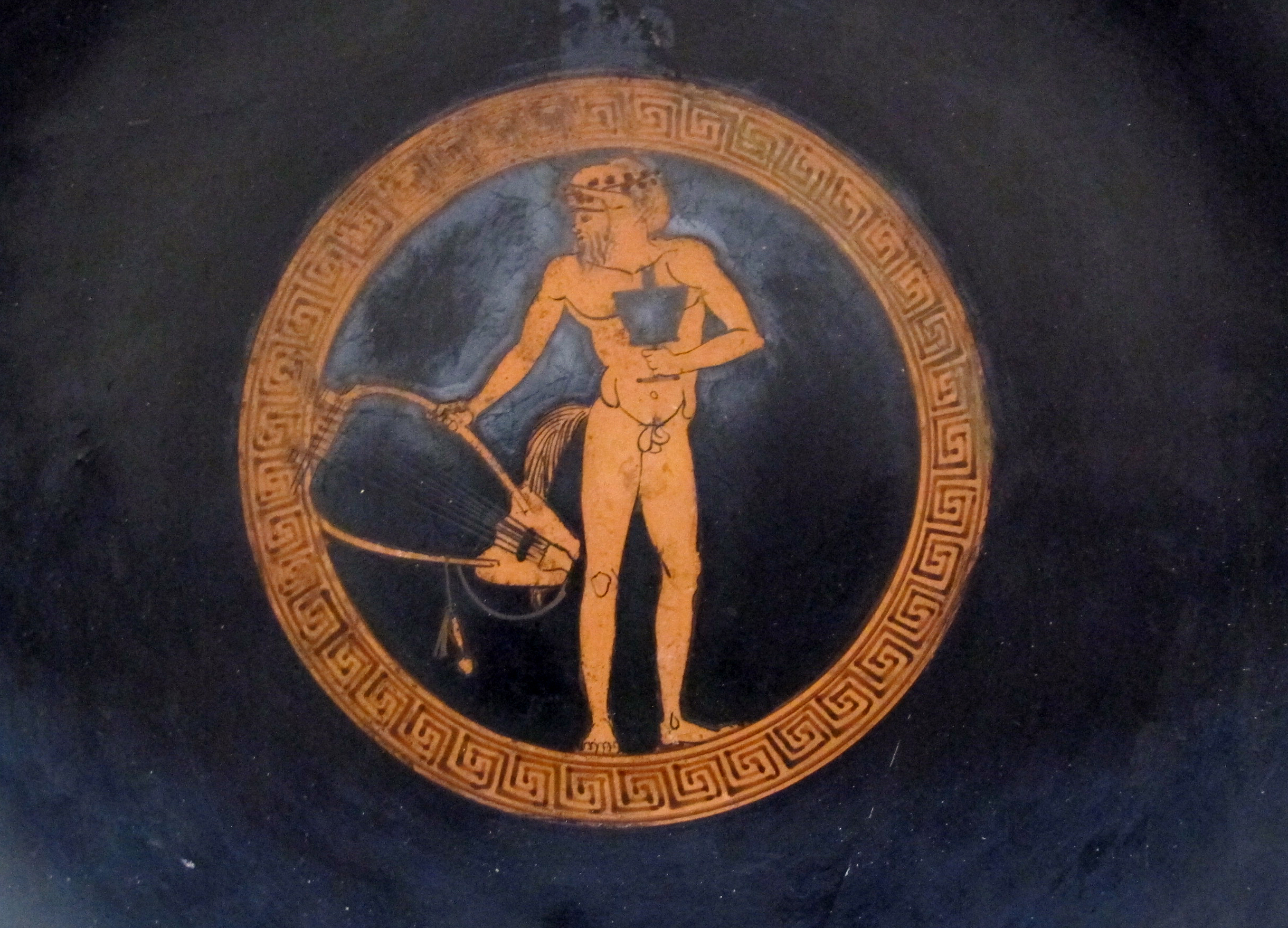 Pittore della clinica, coppa attica a figure rosse da vulci con satiro che tienre un kantharos e una lira, 500-480 ac. ca